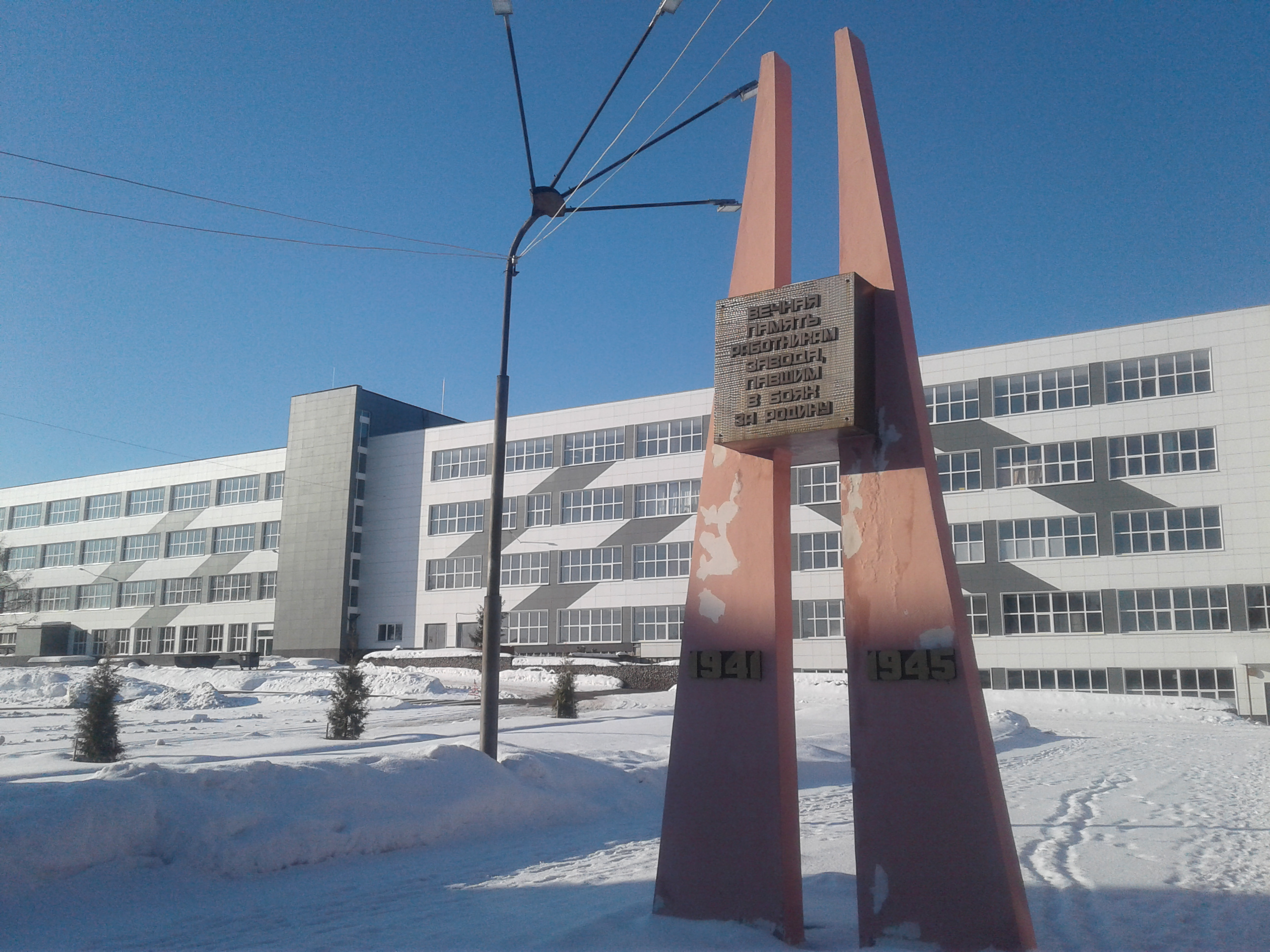 Монумент славы, посвященный боевой и трудовой славе рабочих и служащих механического завода в годы Великой Отечественной войны 1941-1945 гг.: Промышленная улица, 8 Механический завод, Ижевск, Удмуртия